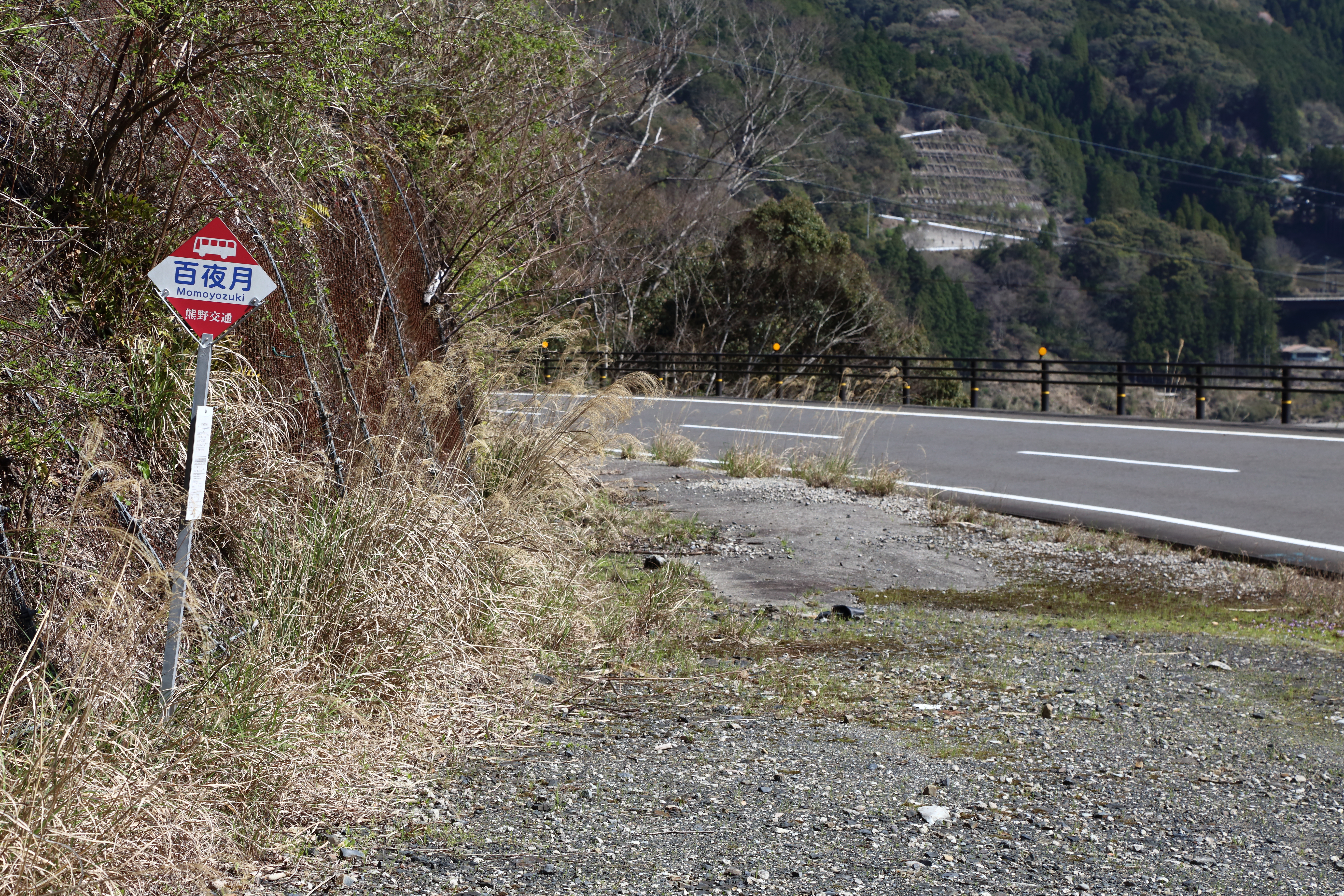 熊野御坊南海バス 百夜月バス停 ※旧国道（トンネル横）のバス停看板は撤去されています。 和歌山県新宮市熊野川町九重